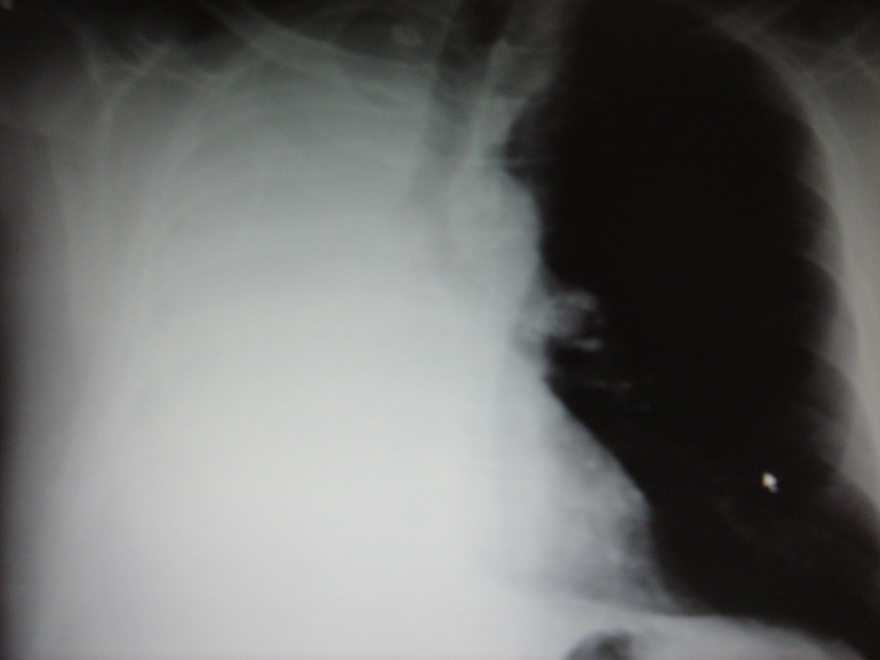 Atelectasia completa de pulmón derecho